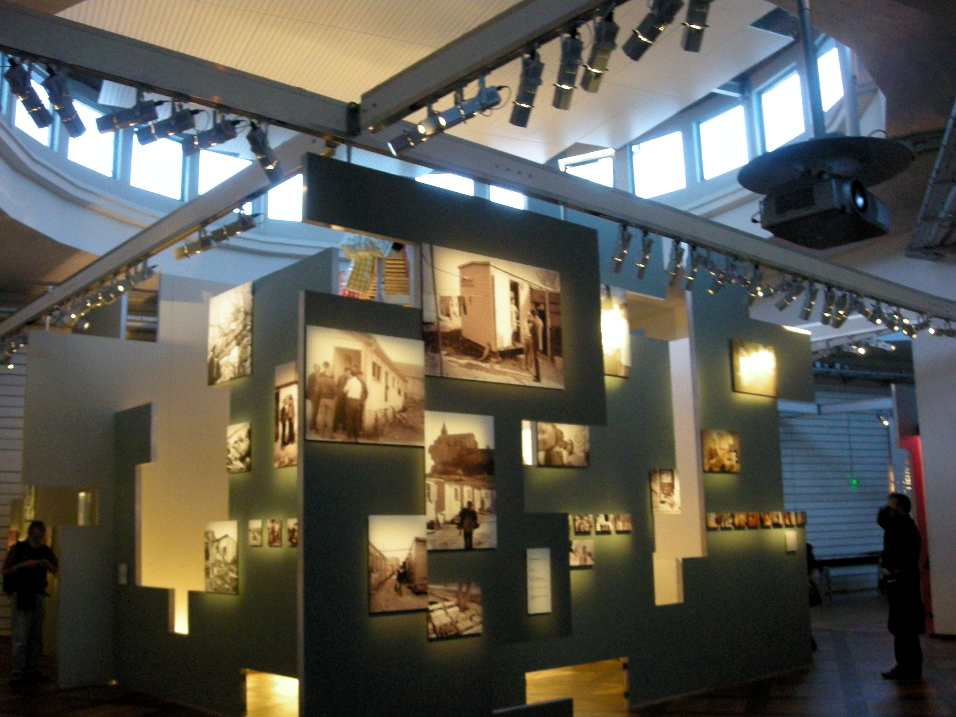 Salle d'exposition permanente à la Cité nationale de l'histoire de l'immigration à Paris